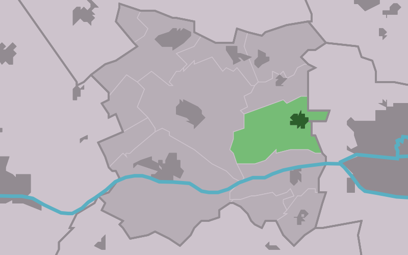 Kaartsje fan himrik fan Marsum